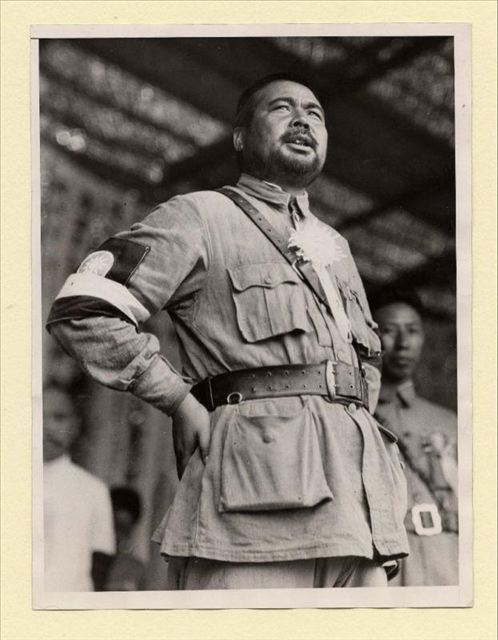 馮玉祥, 字煥章 (1882 - 1948)